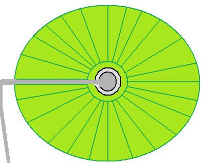 Brøndby have